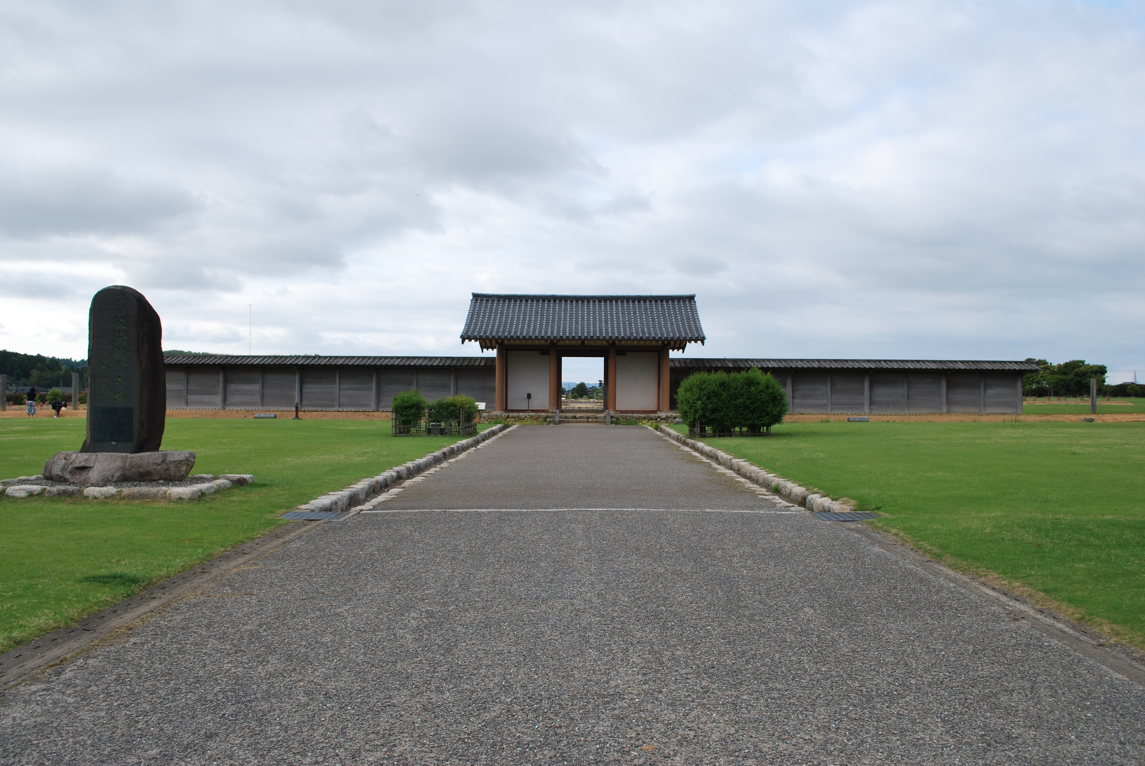 能登国分寺復元南門